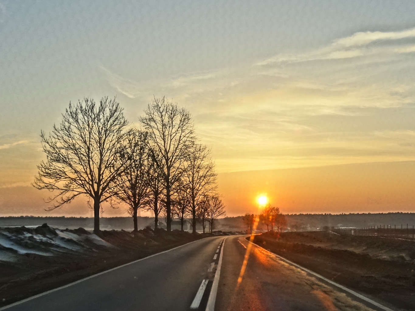 Droga krajowa nr 15 w Polsce na odcinku Brodnica - Kowalewo Pomorskie